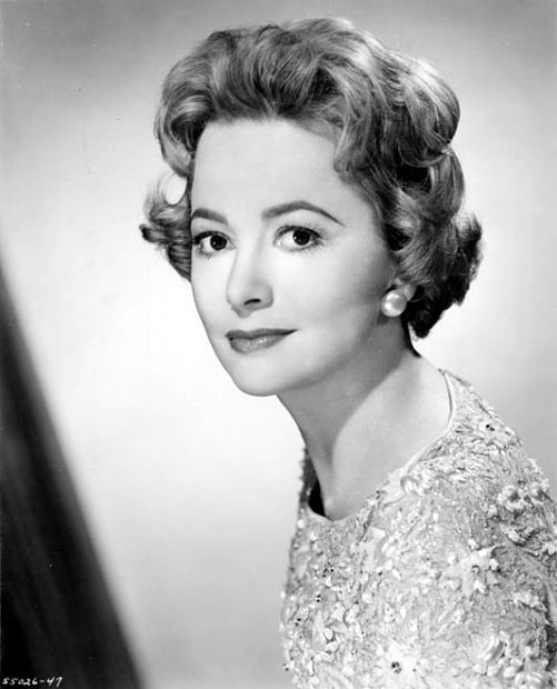 Olivia de Havilland promotional photo, 1959